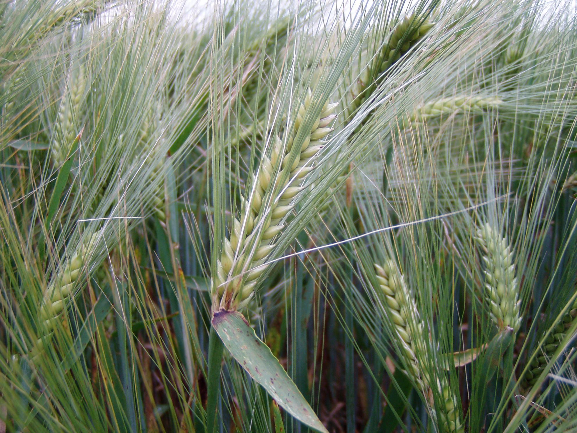 Hordeum vulgare subsp. hexastichum – Epis d'escourgeon bien formés juste avant la maturation Original: escourgeon (nom donné en Belgique à l'orge d'hiver à 6 rangs) épi à sa croissance maximum avant maturation (champ à Fernelmont en Hesbaye)-(nom scientifique: Hordeum vulgare subsp. vulgare)